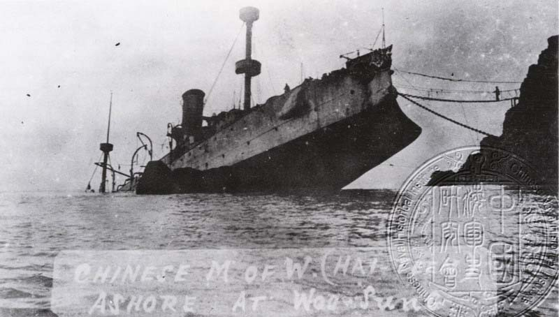 Затонувший крейсер "Хай-Тиен". Фото